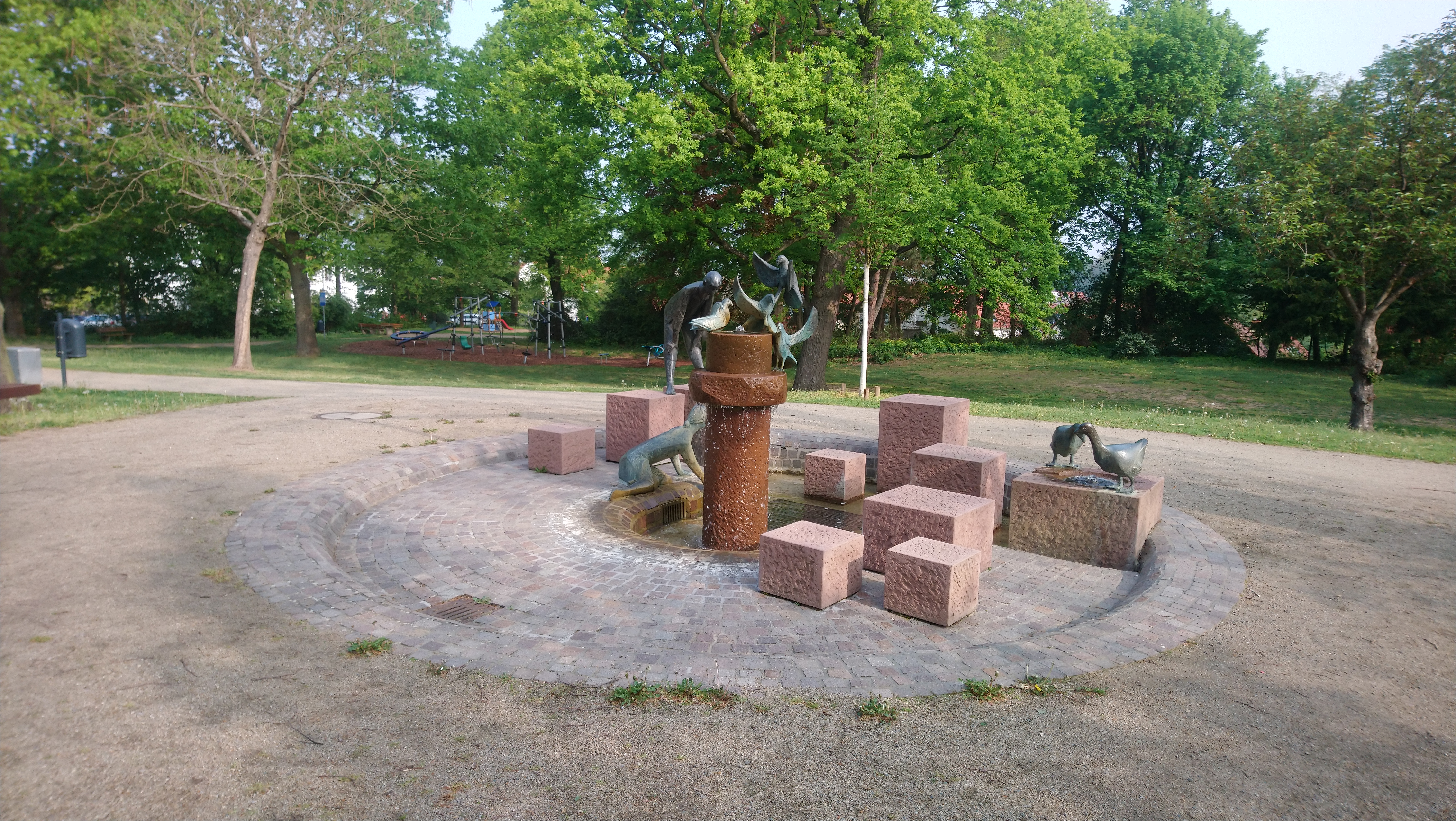 Der Brunnen am Hauckwald in Alzenau